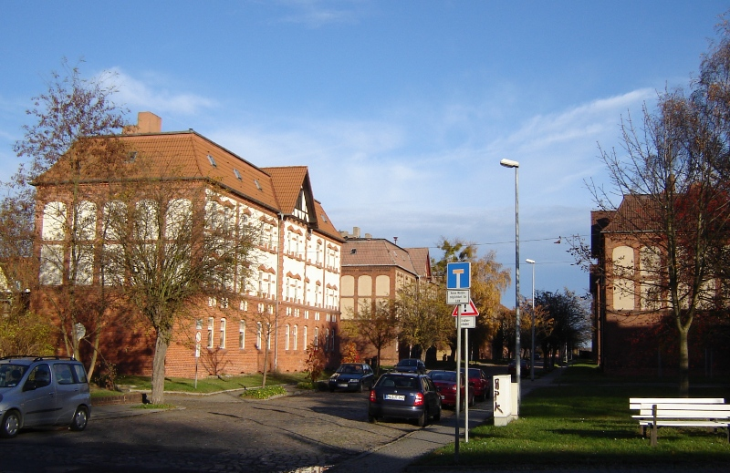 Ehemalige Bahnsiedlung in Magdeburg-Salbke